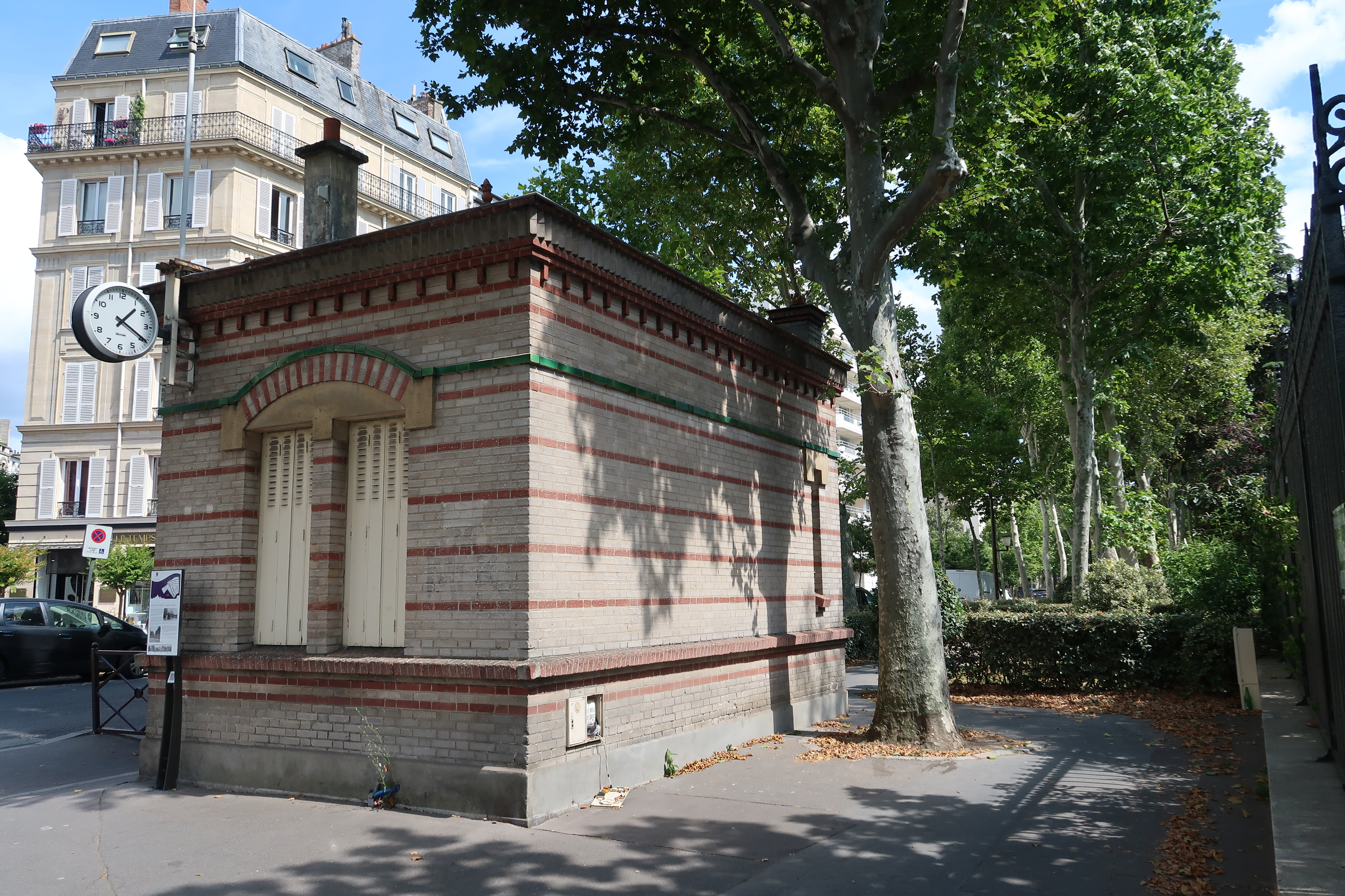 Octroi de Neuilly-sur-Seine, au croisement du boulevard Bineau et de la rue Parmentier (Hauts-de-Seine).